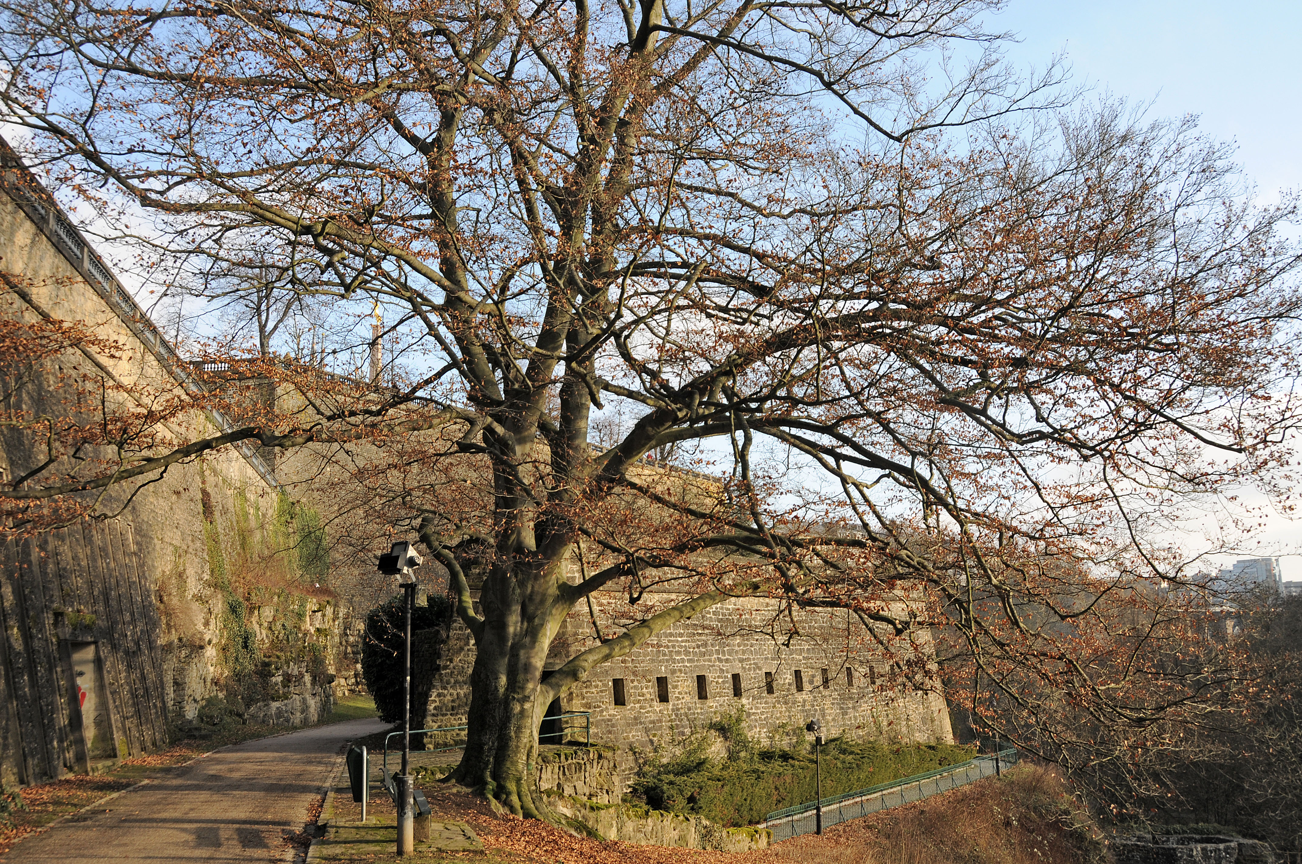 Buch am Péitrusdall, Bastioun Beck